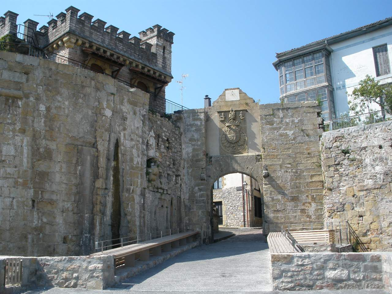 Puerta de Santa María (Fuenterrabía)